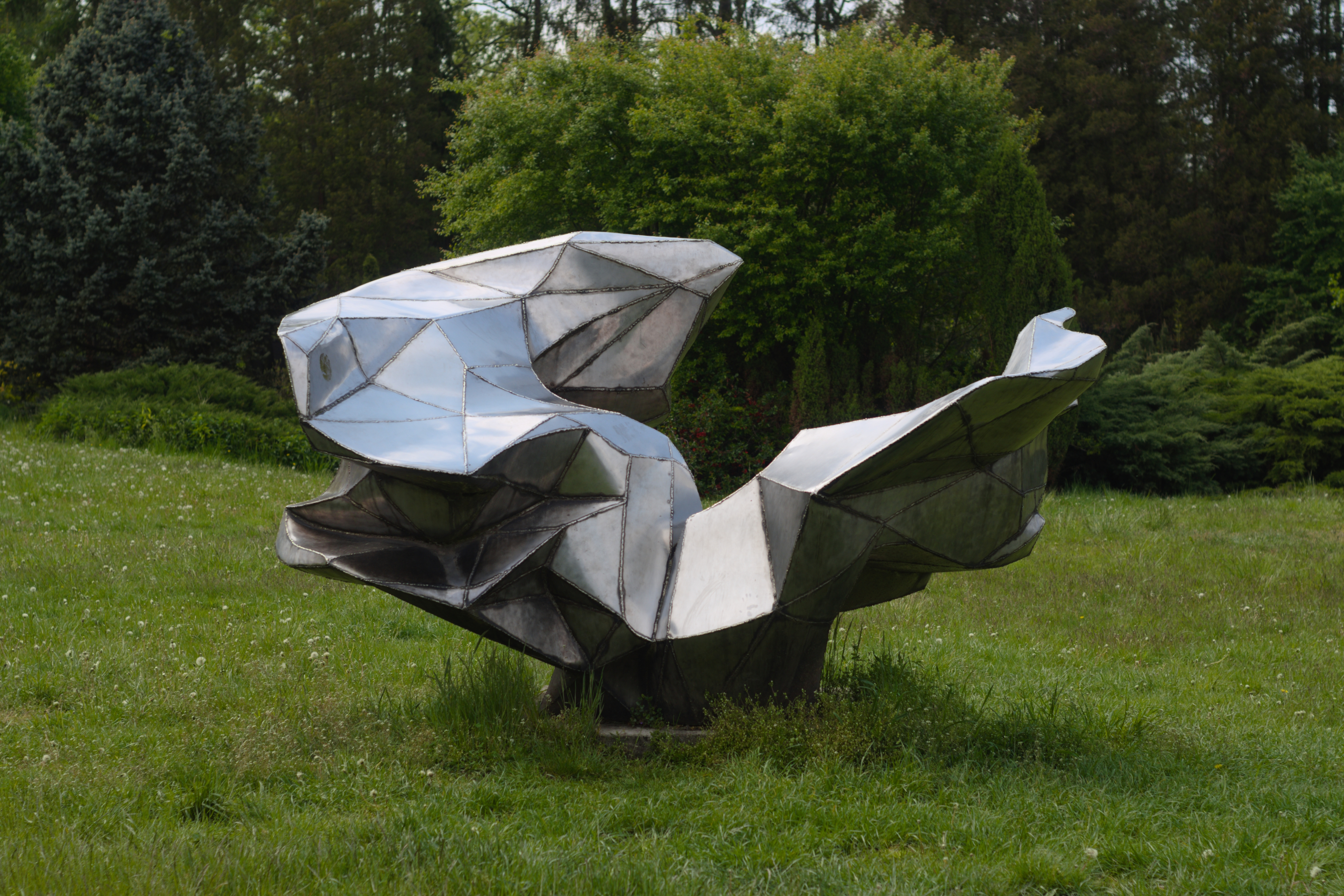 rzeźba plenerowa „Szum wiatru” autorstwa Gerarda Grzywaczyka w Katowickim Parku Leśnym; stal spawana